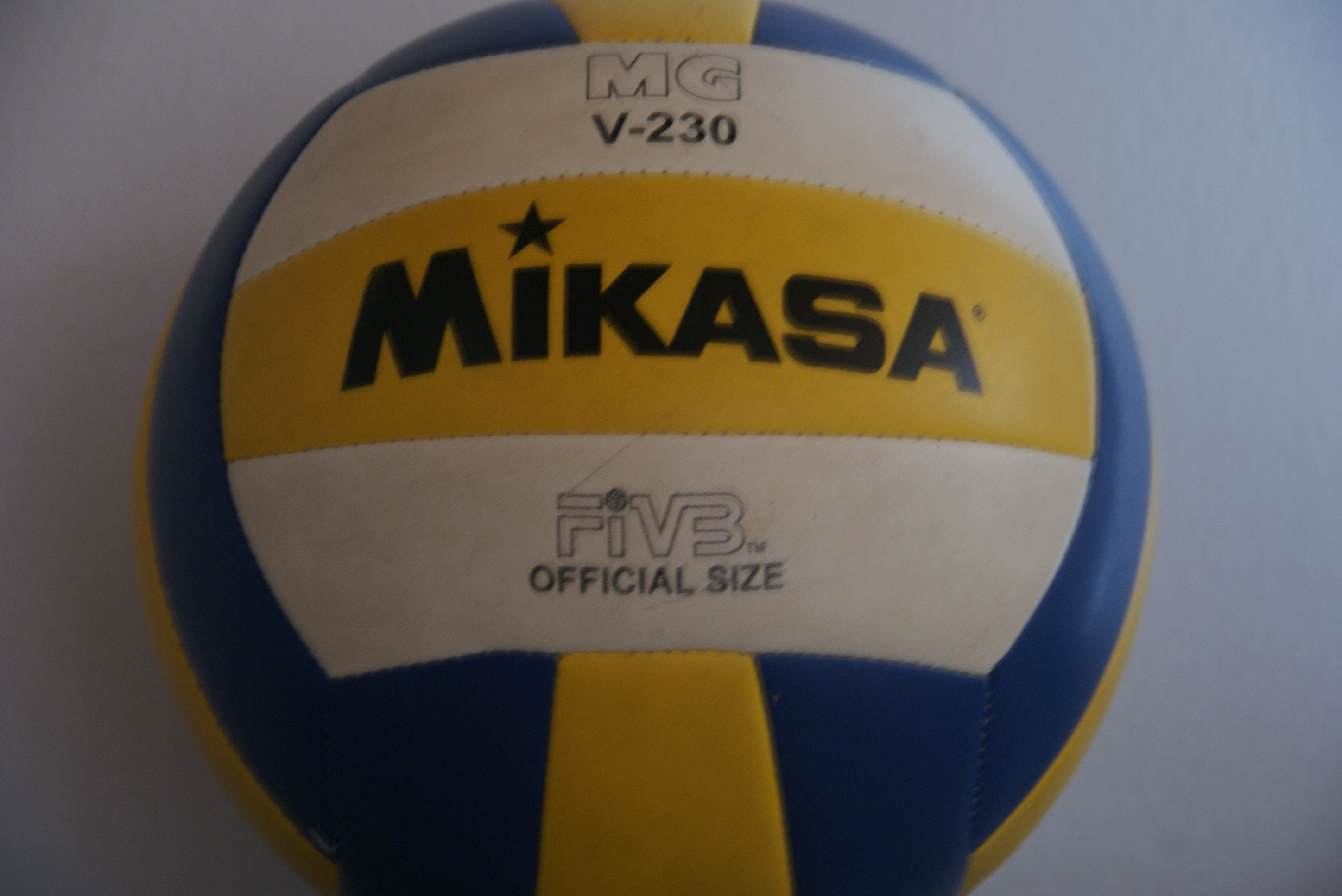 Piłka do siatkówki firmy Mikasa stworzona na mistrzostwa